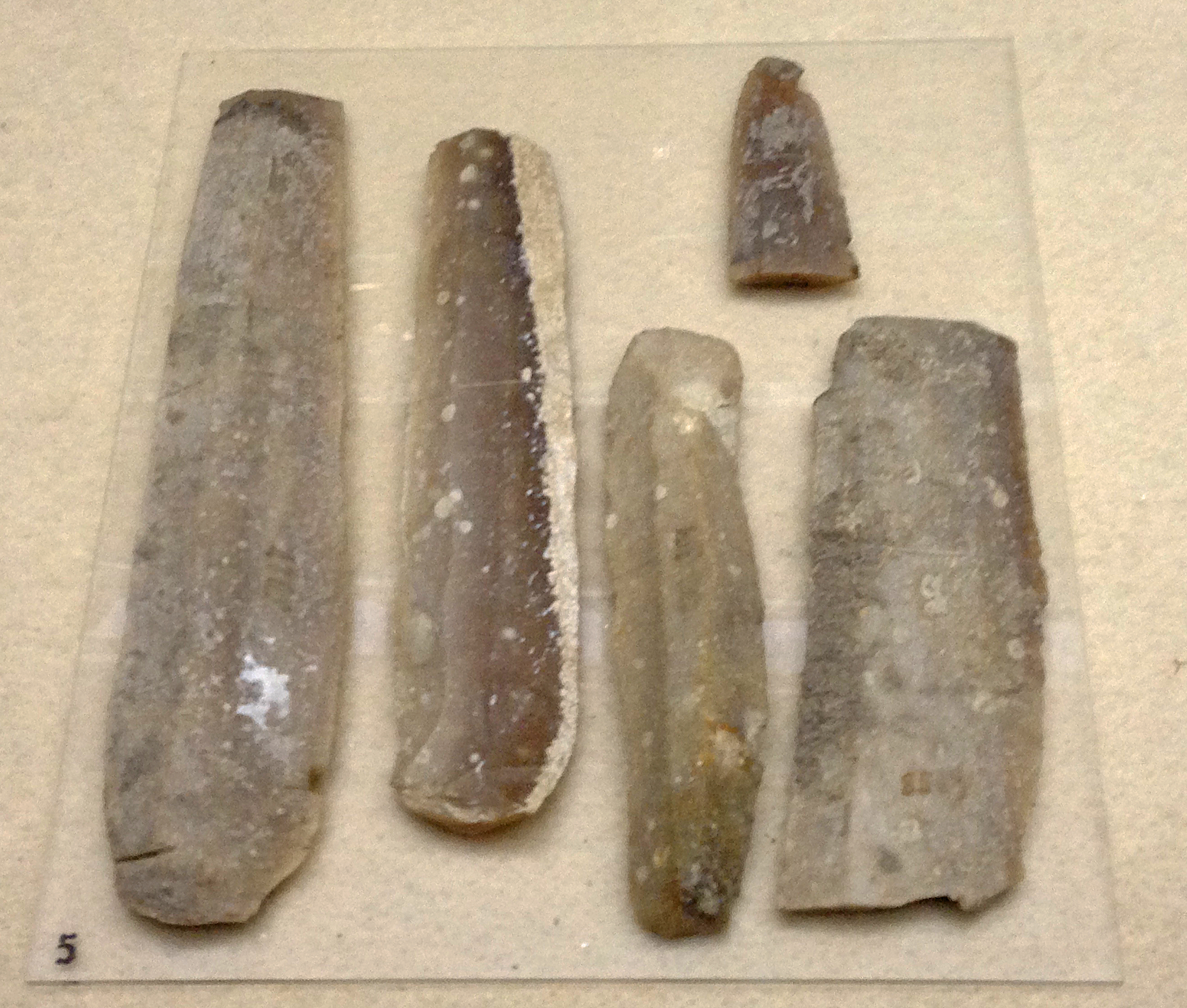 Frammenti di lame in selce. Neolitico medio. Cultura di Stentinello. Fine VI prima metà V millennio a.C.